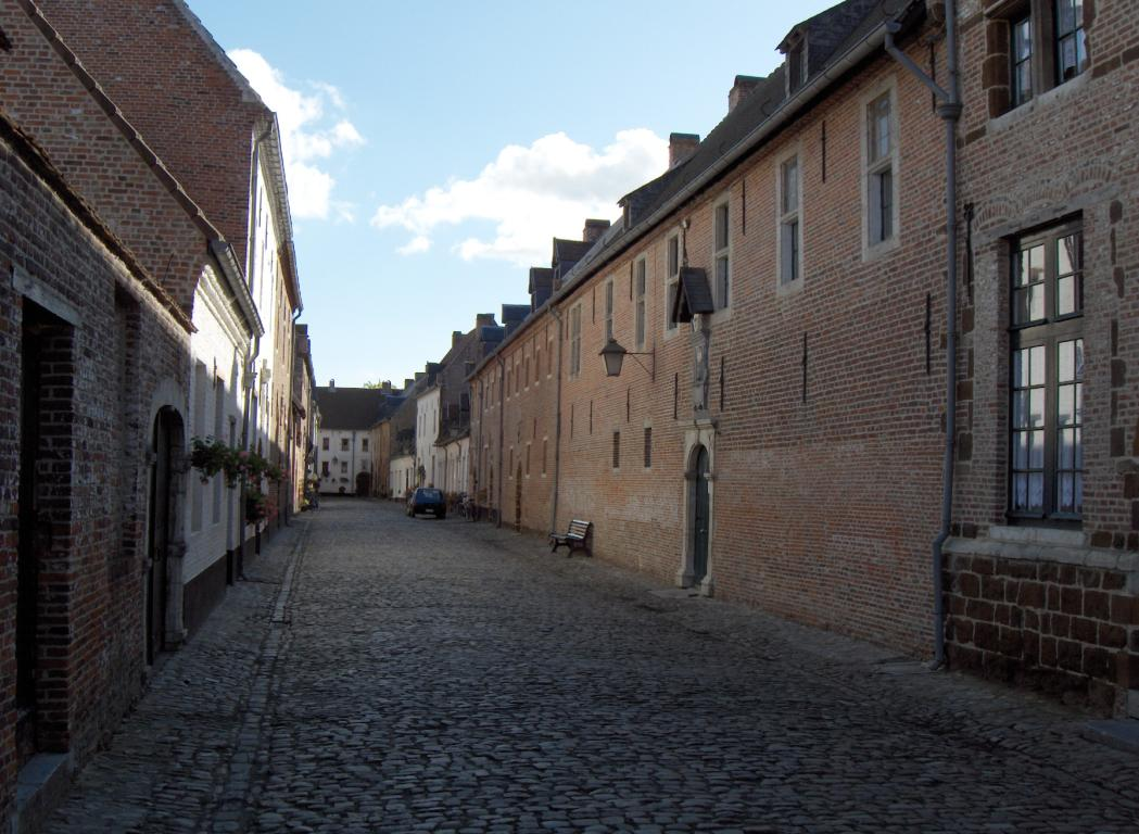 Straat (Engelen Conventstraat) in het Begijnhof van Diest.